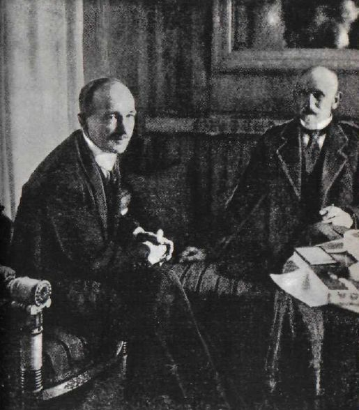 Prezydent Czechosłowacji Edvard Beneš z wizytą u prezydenta Polski, Stanisława Wojciechowskiego.